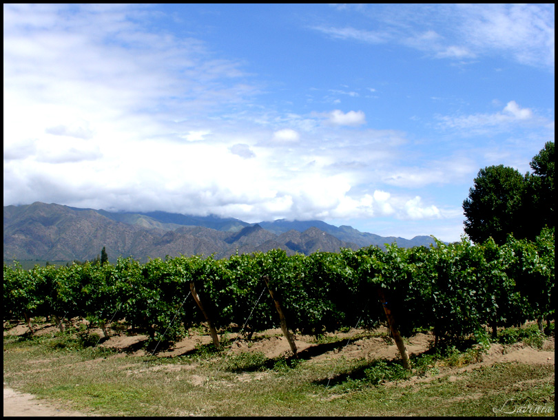 Vasija Secreta ::: Cafayate ::: Salta ::: Argentina. Torrontes vineyard